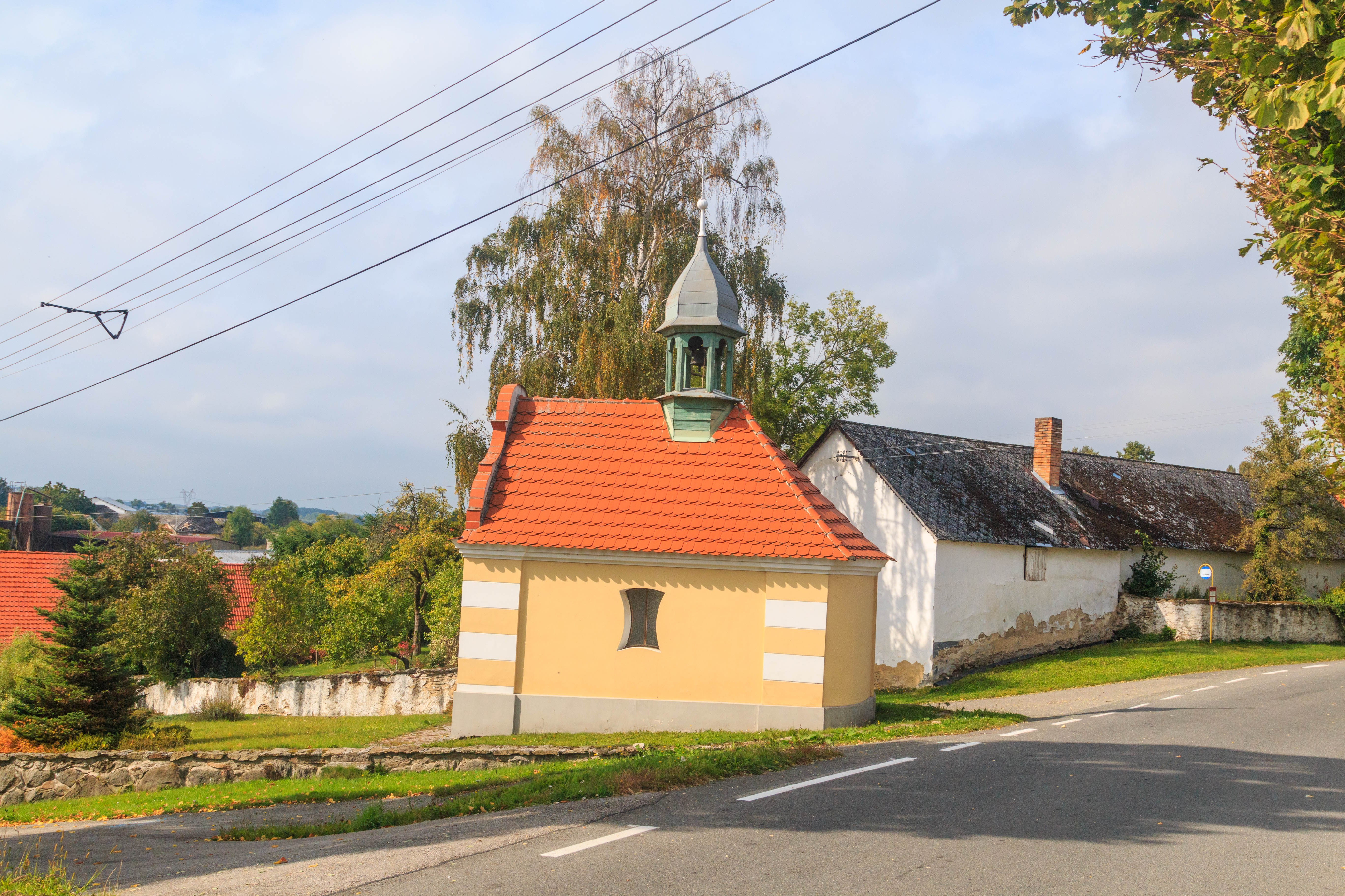 Leskovice - kaple